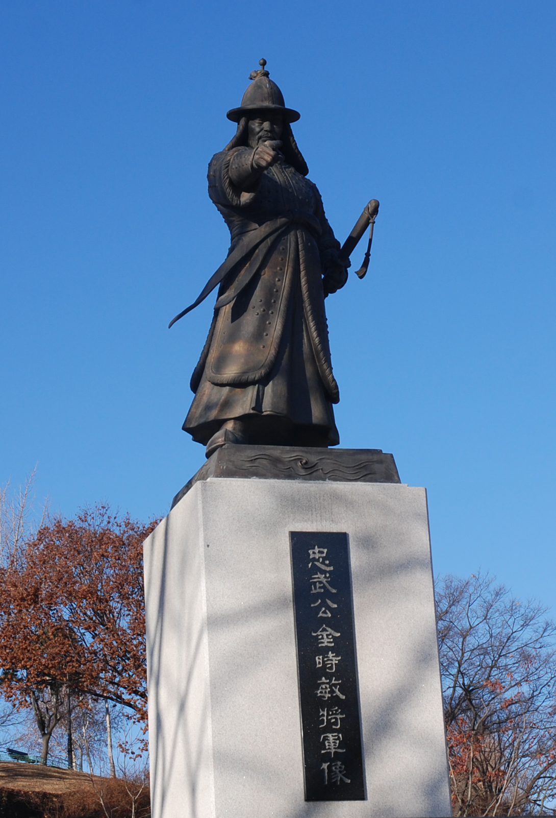 General and Governor Kim Si-min, 1592